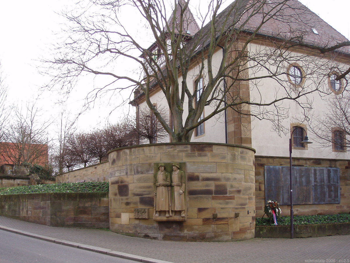 Kriegerdenkmal bei der Peterskirche in Heilbronn-Neckargartach, Gesamtansicht